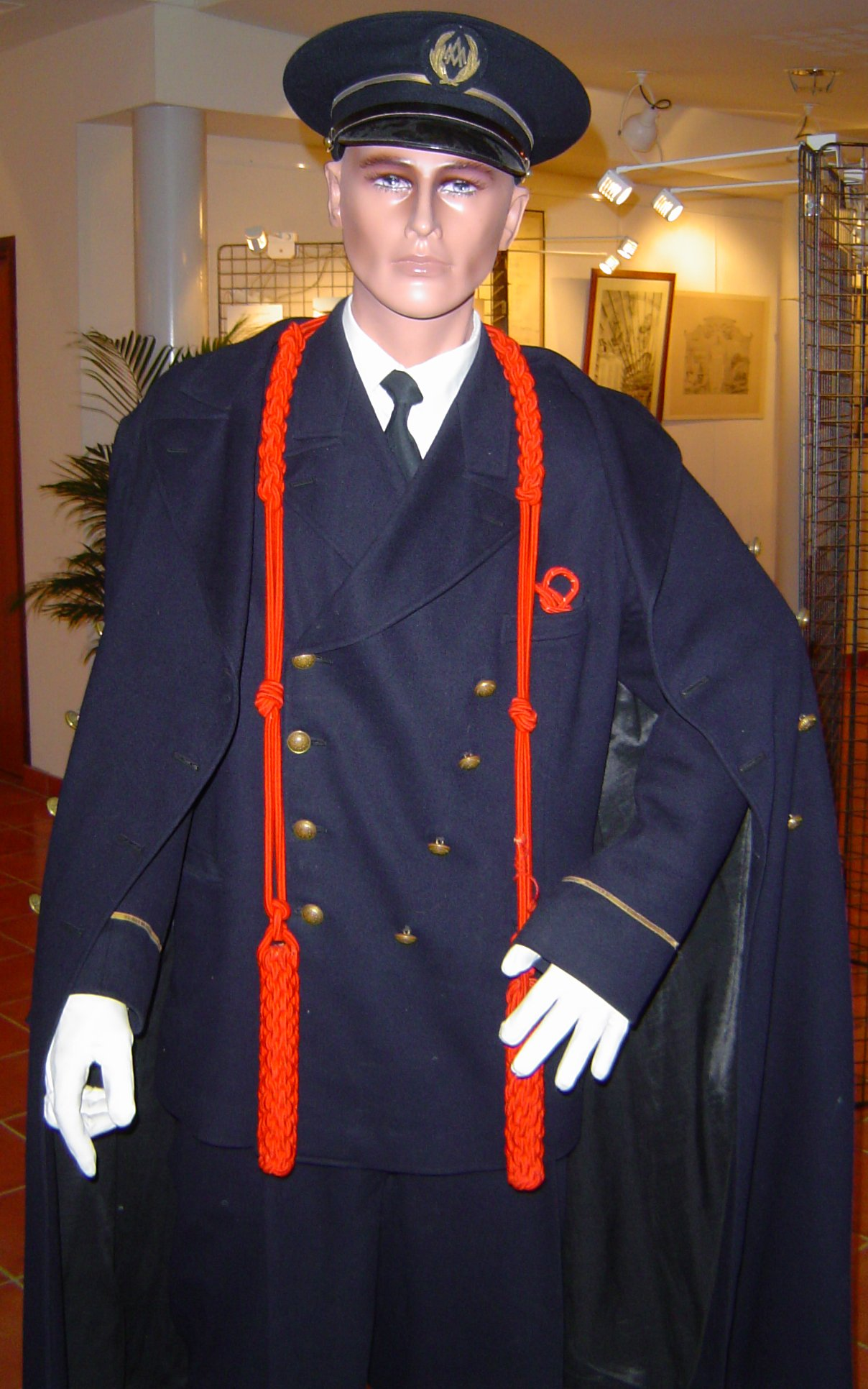 Photo d'un uniforme de Gadzarts sa version d'âpres 1935. L'uniforme tel qu'il est présenté souffre de quelques incohérences dans ses détails qui sont complètement imperceptibles pour un non initié (la figniolante et le fignoss ne sont pas assorties). Photo prise par l'utilisateur Beretta_vexee le 3 décembre 2006 lors de la préparation des cérémonies du bicentenaire du CER ENSAM de Châlons sur marne.